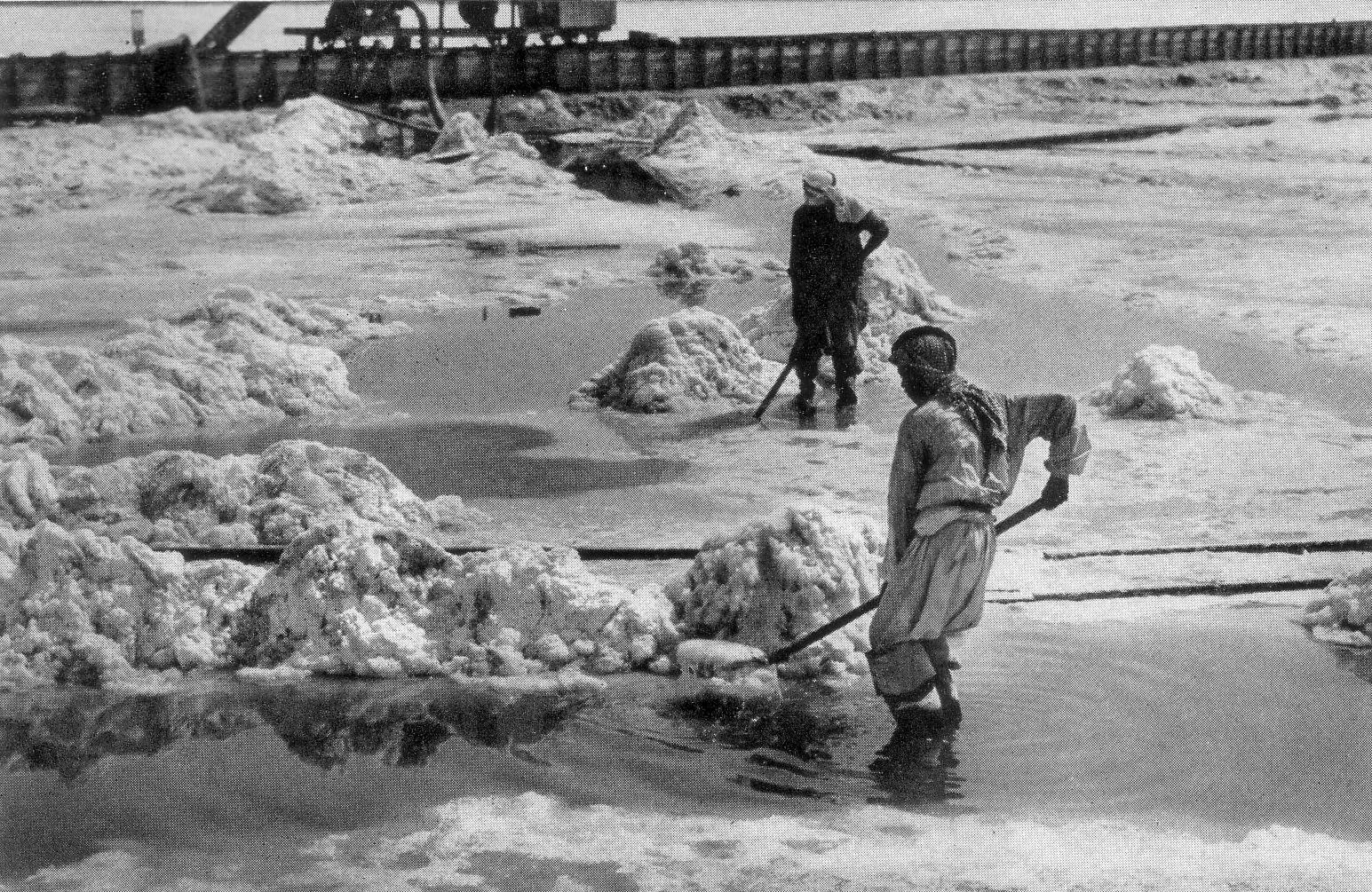 ים המלח, כרייה ידנית של אשלג, 1938